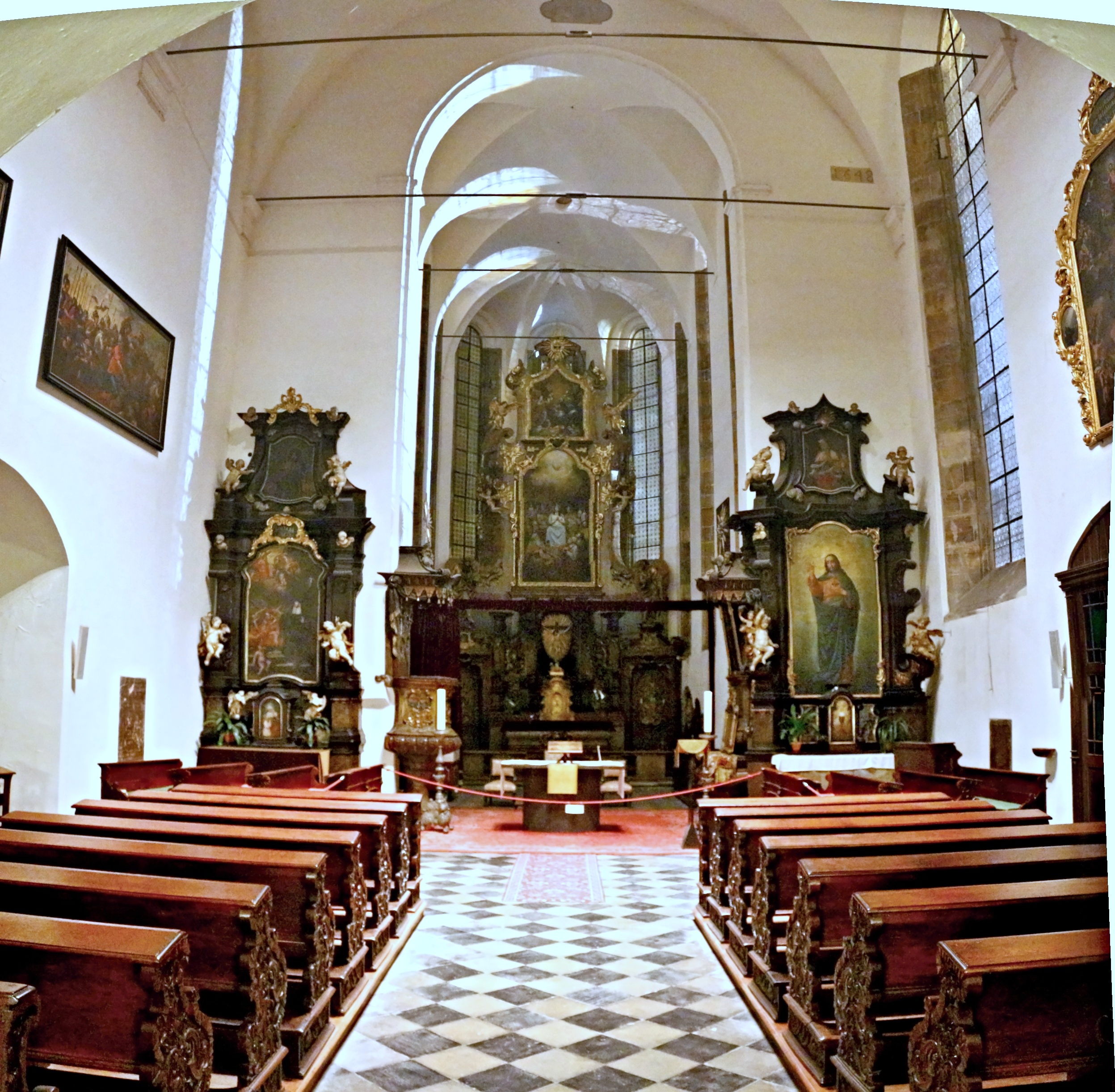 Staré Město, interiér kostela sv. Ducha